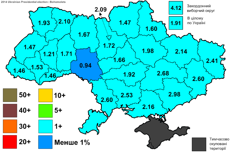 Електоральна підтримка Богомолець Ольги Вадимівни на виборах Президента України 2014.